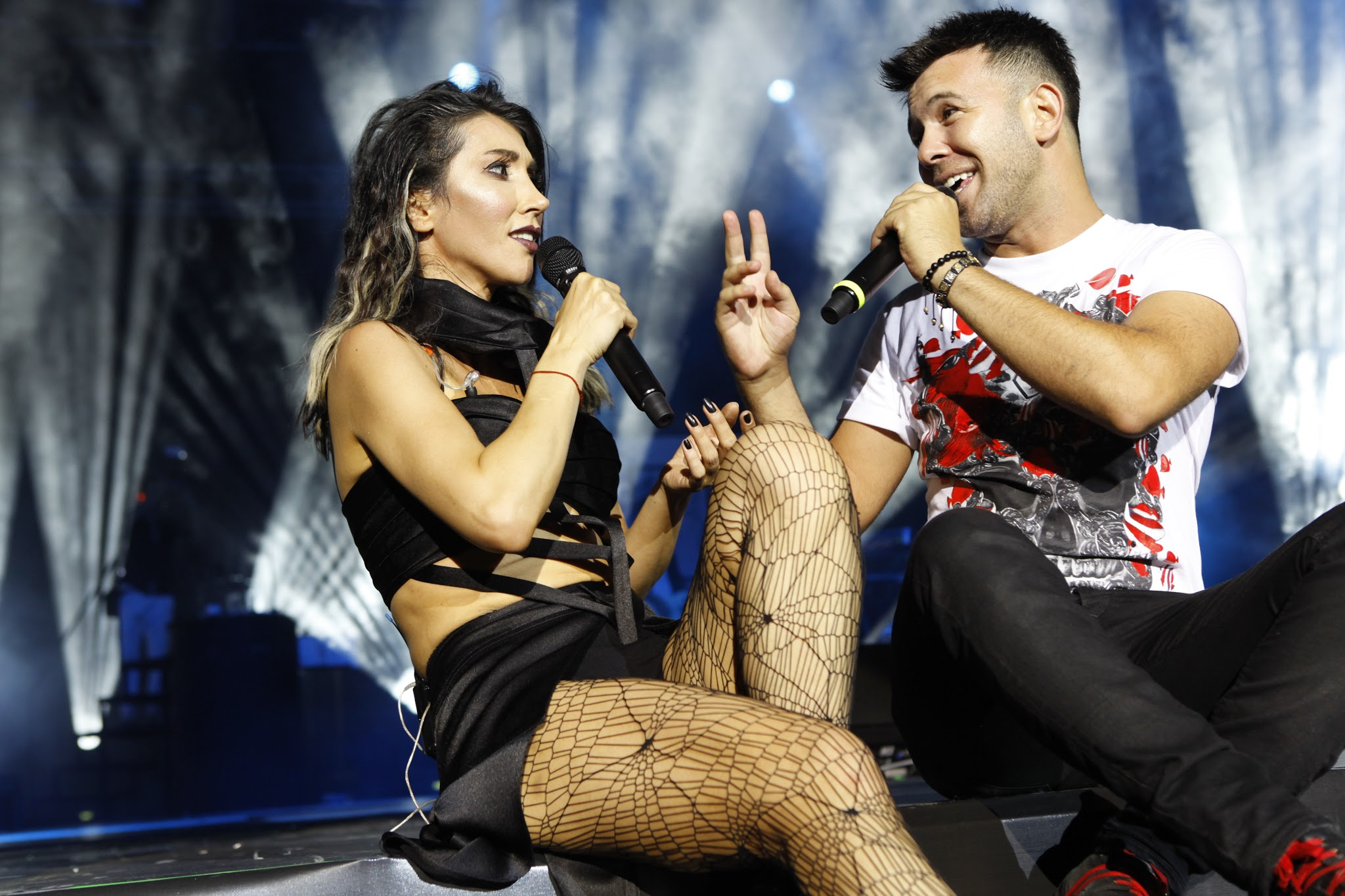 Hande Yener, 31 Temmuz 2015 tarihli Harbiye konserinde Berksan ile birlikte "Haberi Var mı?"yı söylerken.